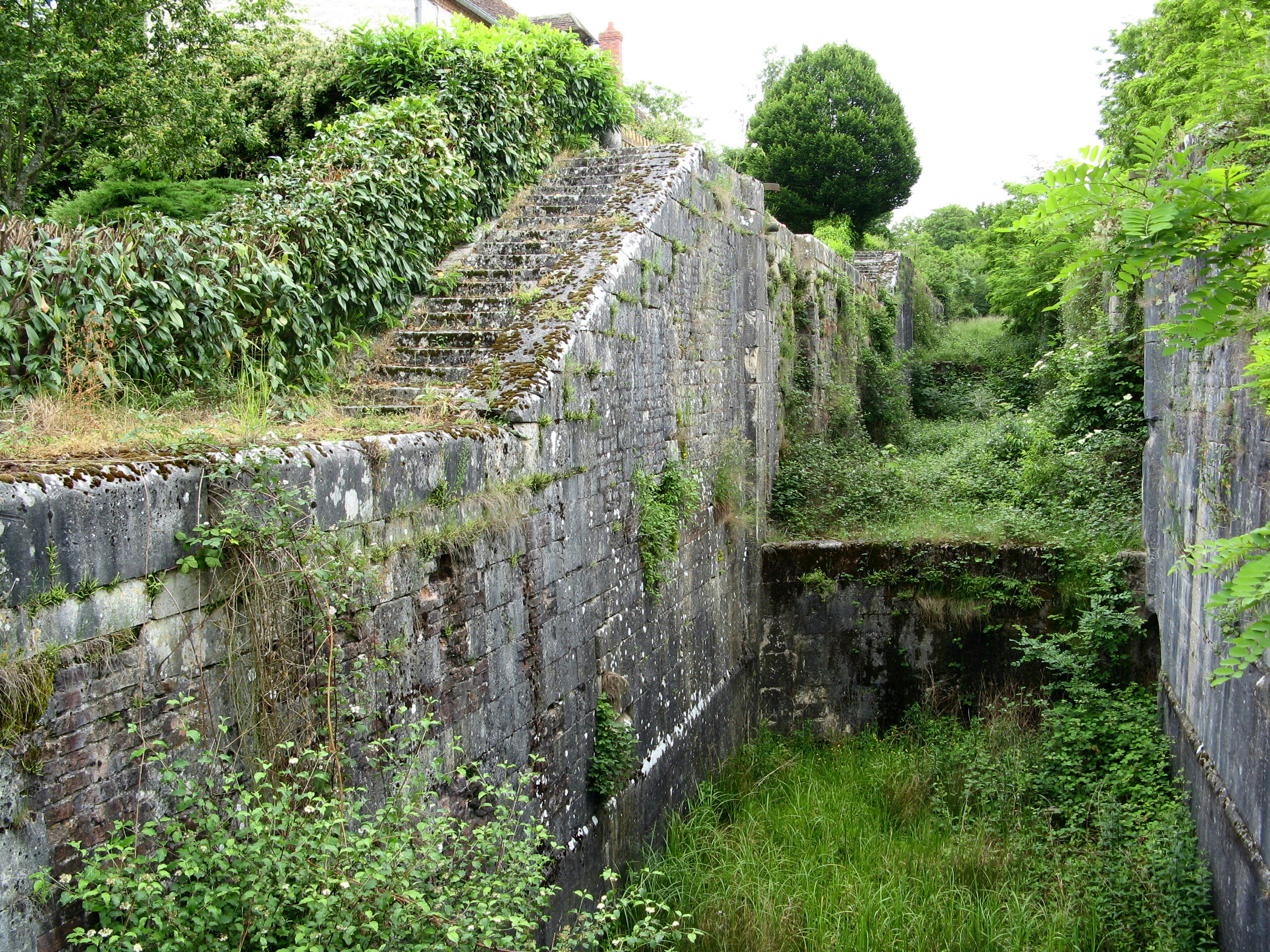 Dammarie-sur-Loing : échelle de 4 écluses sur une section abandonnée du canal de Briare. .